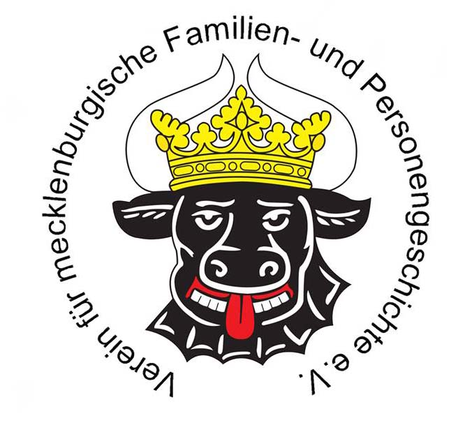 Der mecklenburger Stierkopf hier im Logo des MFP